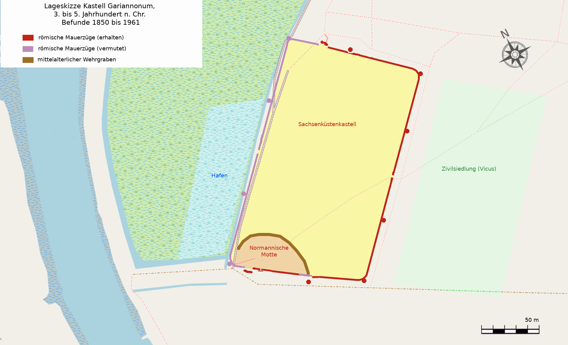 Befundplan des Kastells Gariannonum (Burgh Castle) GB, 3. - 5. Jhdt.n.Chr.